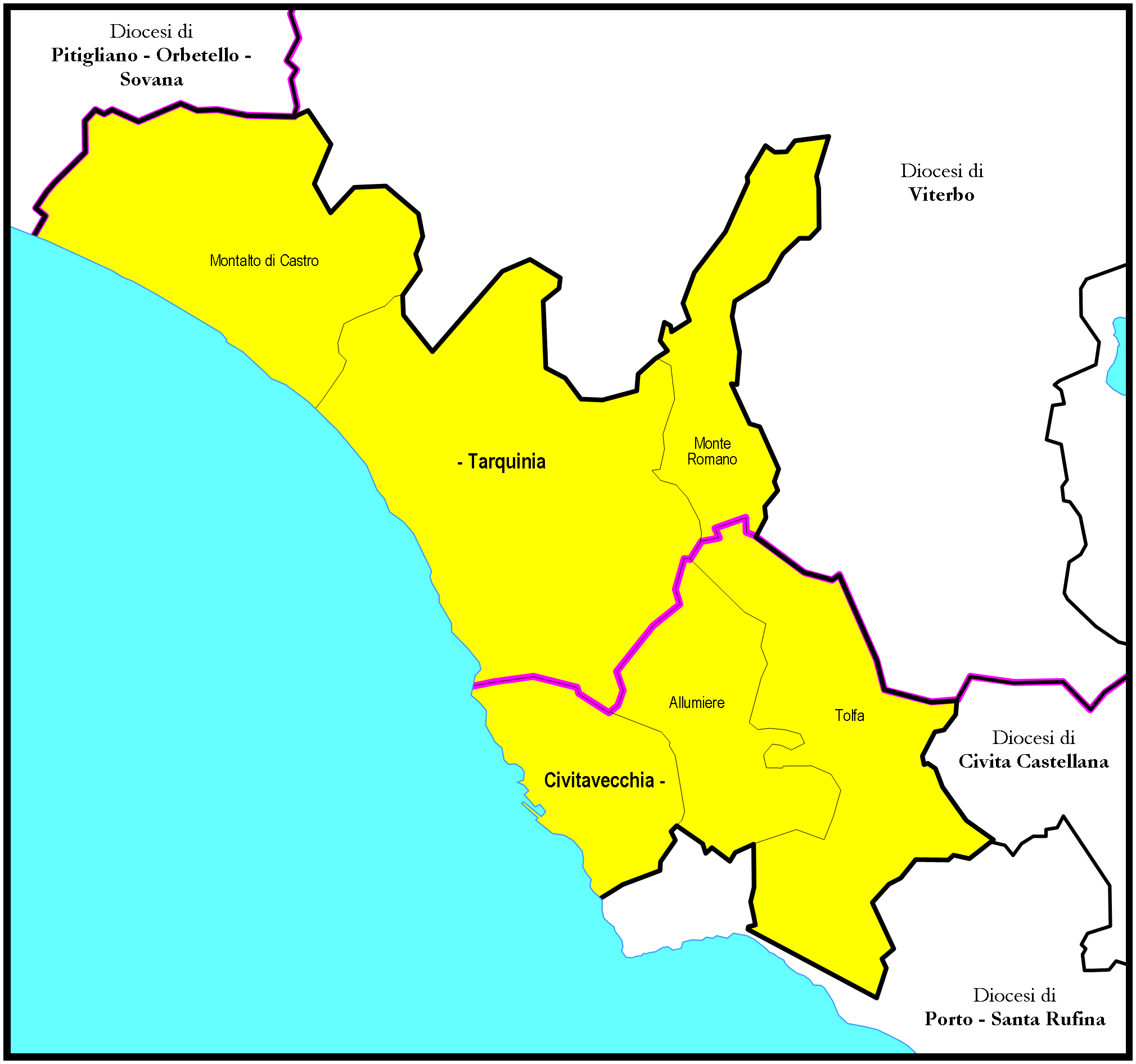 Mappa della Diocesi di Civitavecchia - Tarquinia